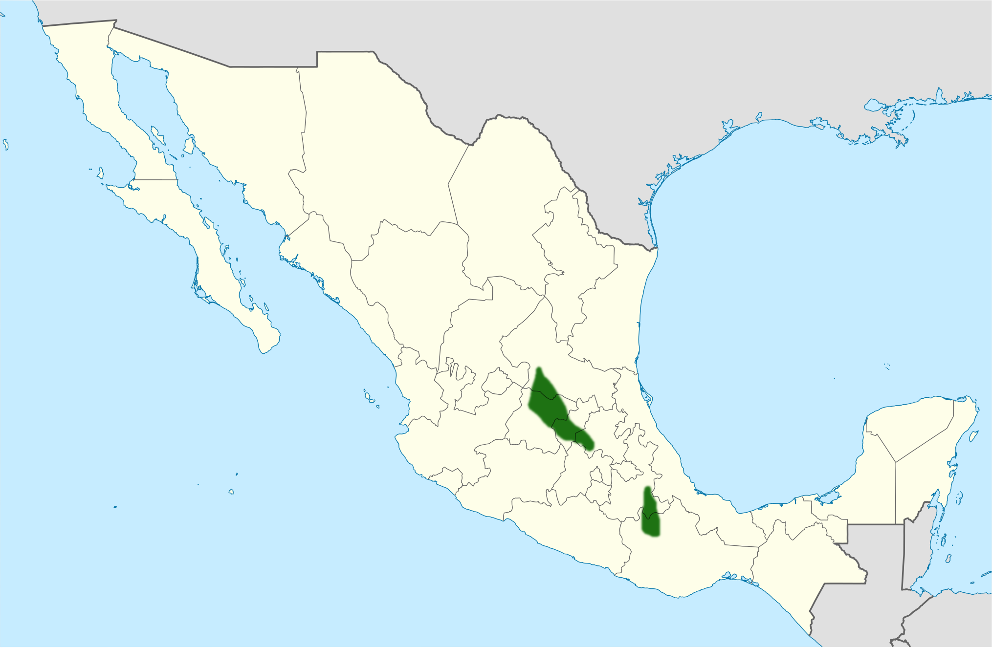 Distribución de Mammillaria zephyranthoides (México)